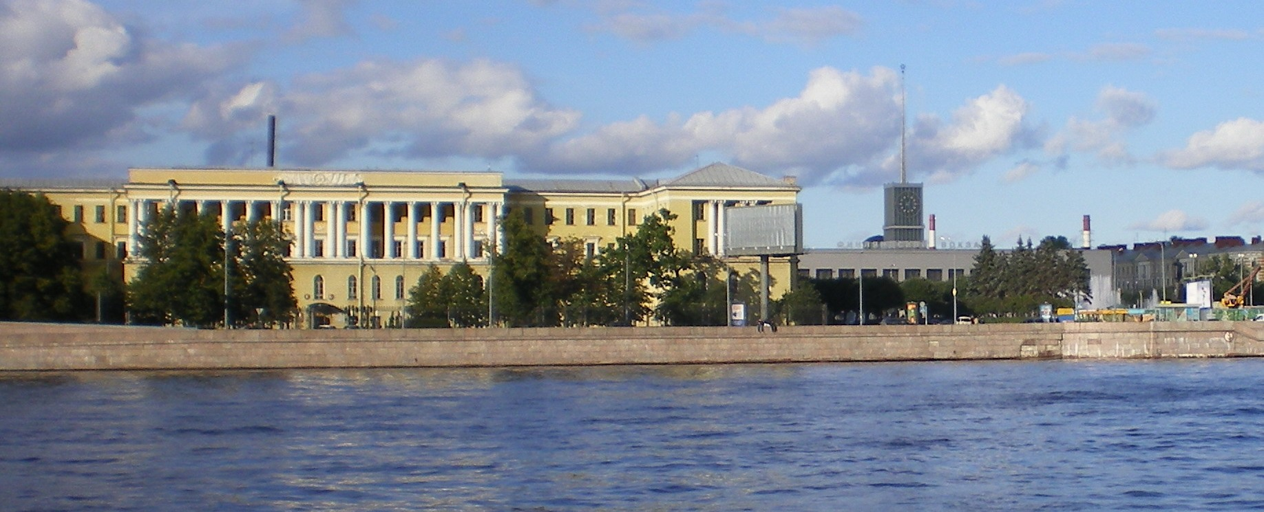 Арсенальная набережная, 15. Здание Михайловского артиллерийского училища и академии (арх. Витовский Леопольд Адольфович), площадь Ленина, спуск к Неве, на заднем плане — Финляндский вокзал.